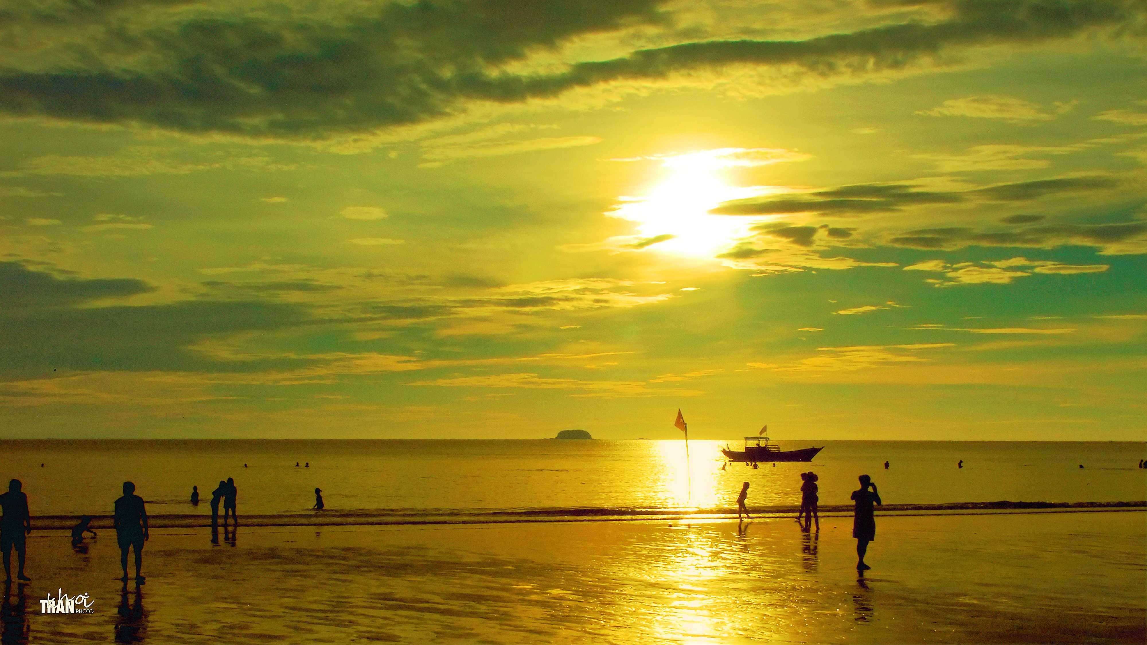 Good morning